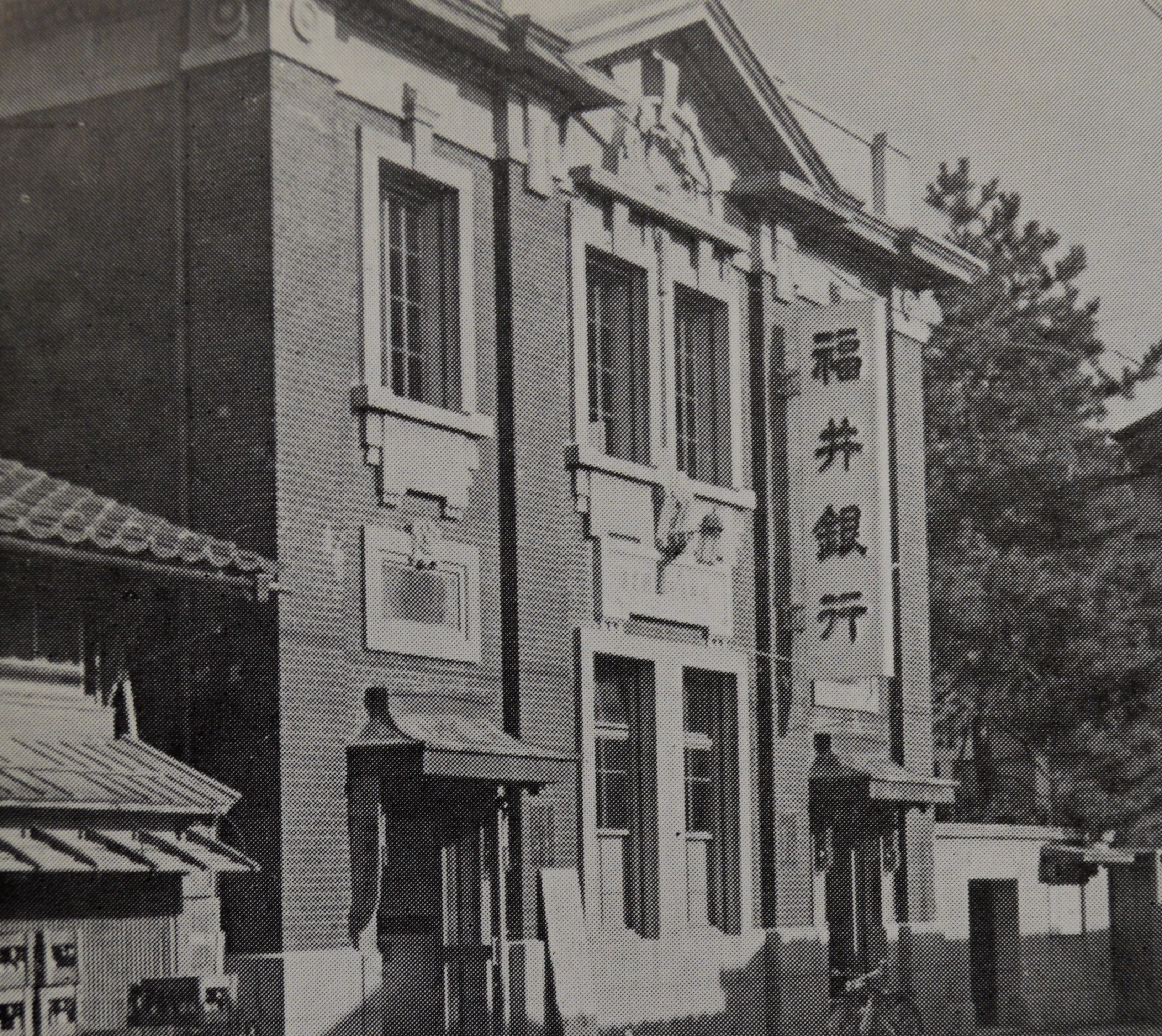 福井県坂井郡三国町にあった福井銀行三国支店。現在の「旧森田銀行本店」。